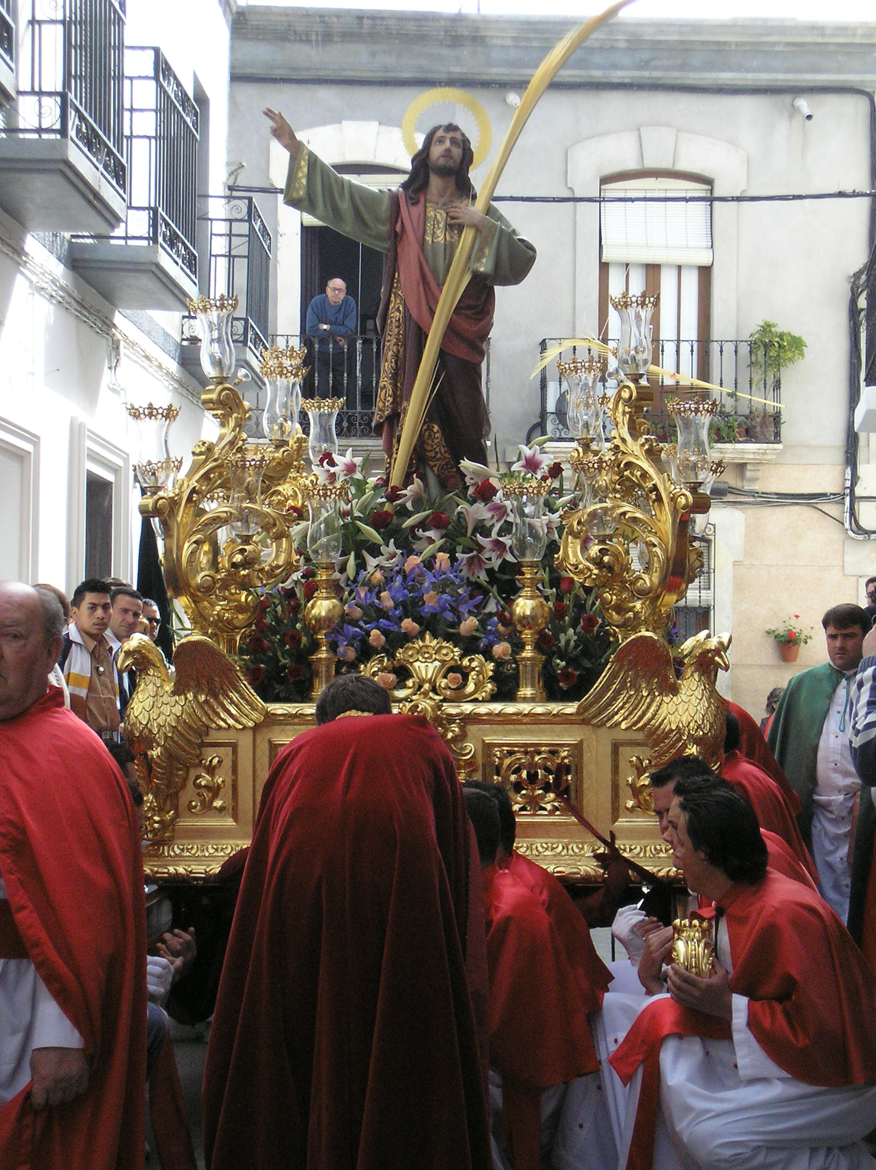 San Juan Evangelista de Sorbas